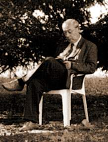 Bernard Bonnejean en méditation dans le parc de ses amis à Valmondois.